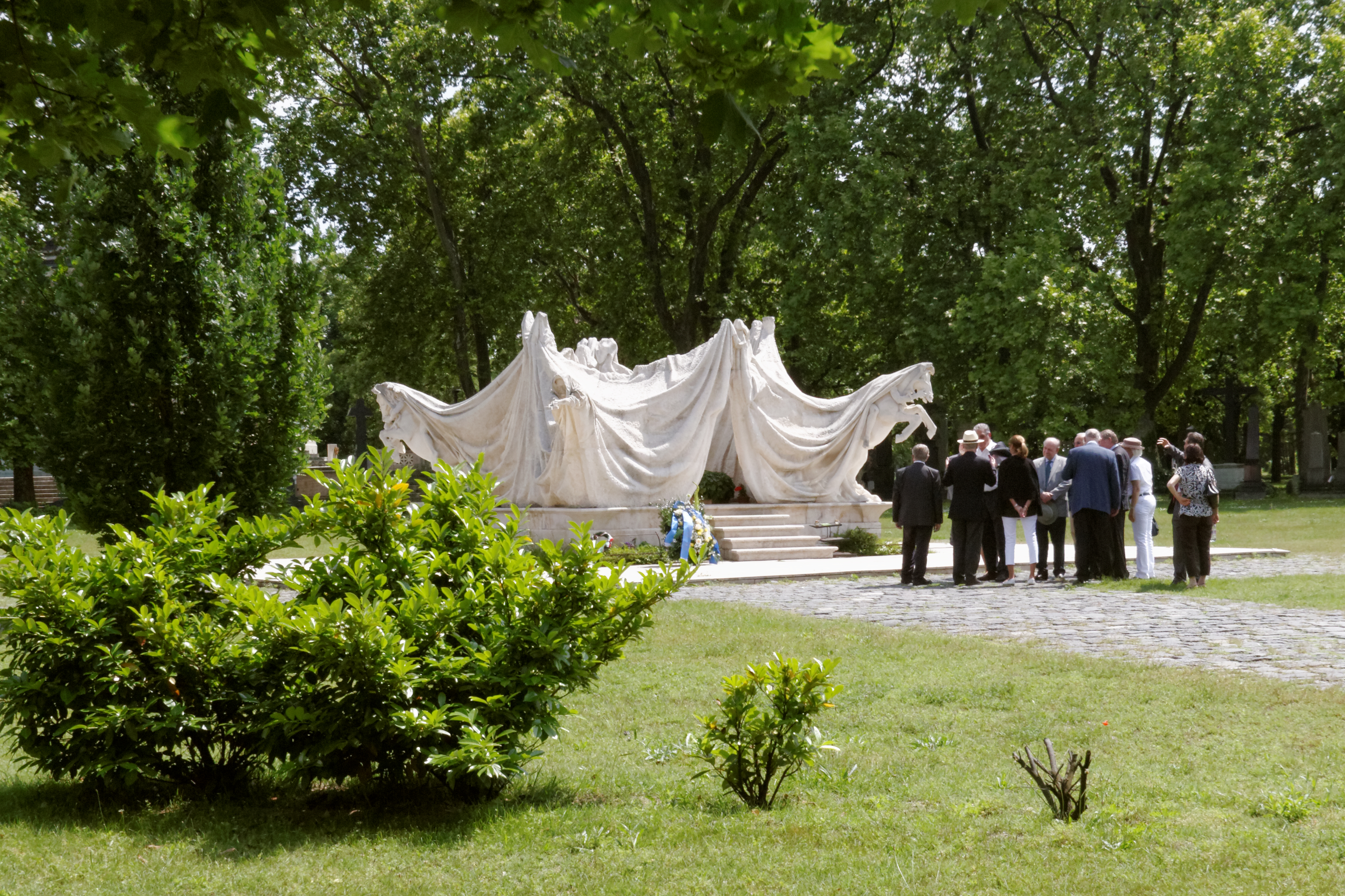 Grabmal Josef Antall